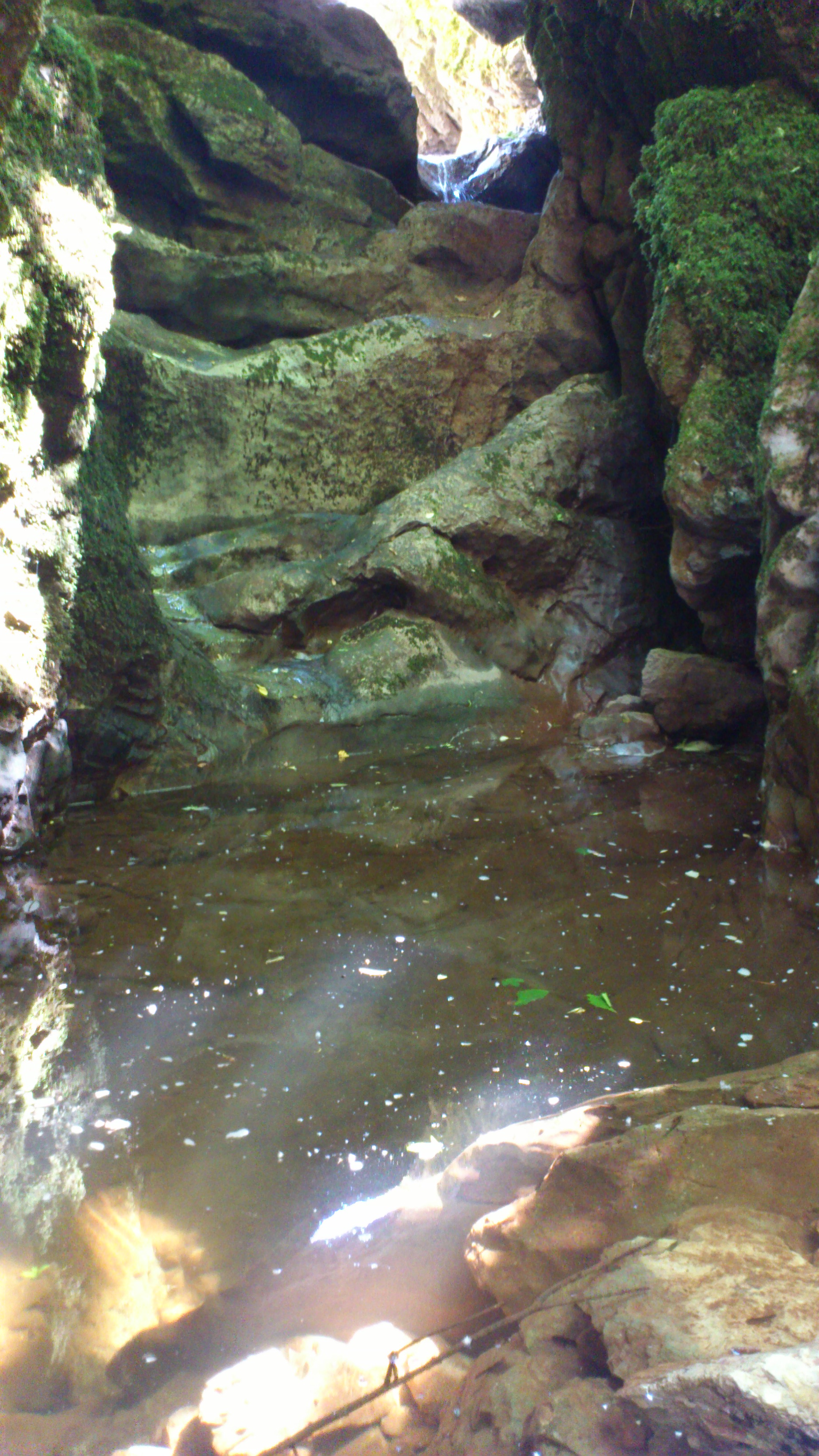 Vodopad na ulazu Cerjansku pećinu